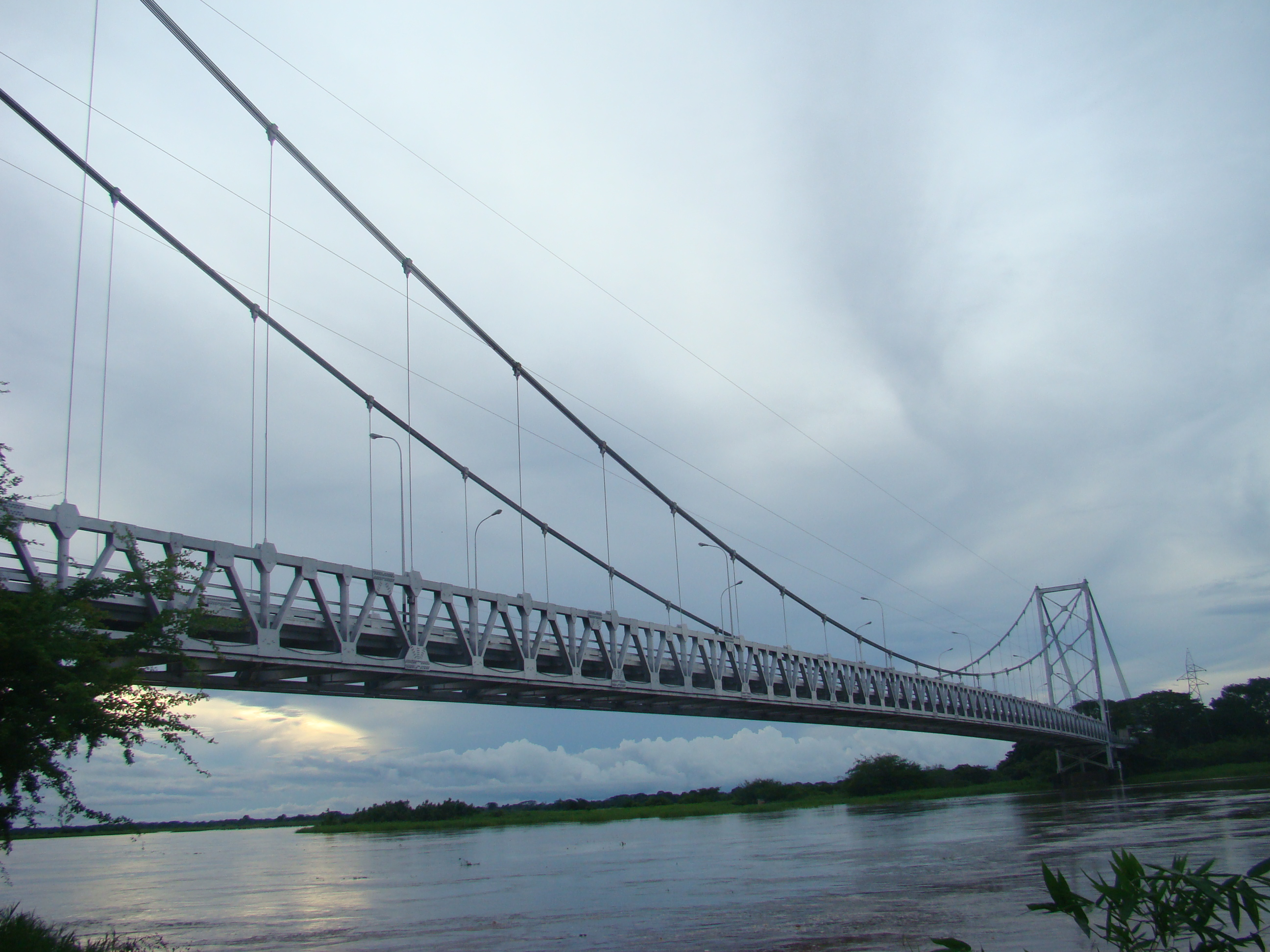 Este es el puente sobre el río Apure que comunica los estados Barinas y Apure en Venezuela